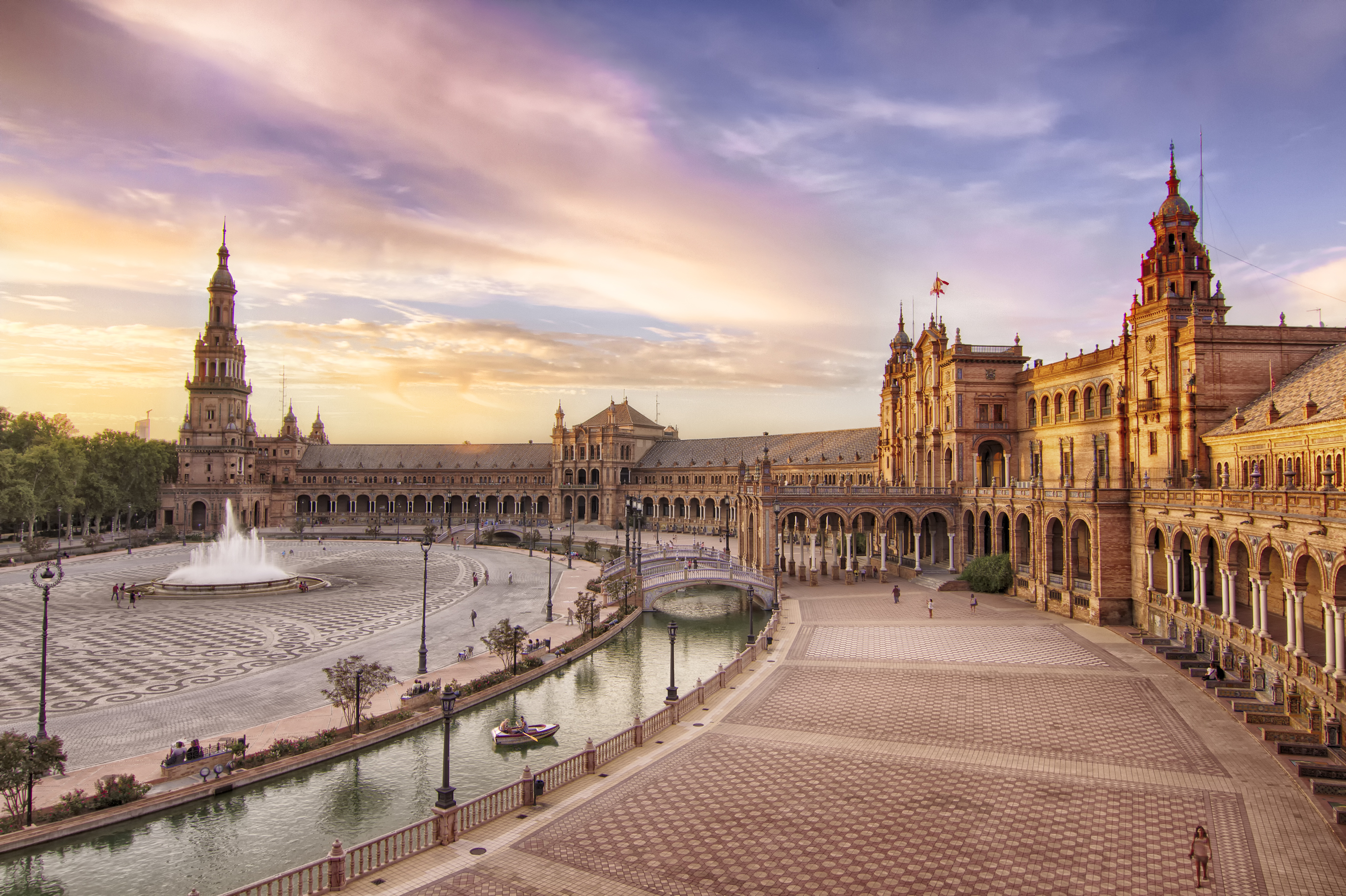 La Plaza de España de Sevilla constituye un conjunto arquitectónico encuadrado en el Parque de María Luisa, configura uno de los espacios más espectaculares de la arquitectura regionalista. Se construyó como edificio principal de la Exposición Iberoamericana de Sevilla de 1929 y en sus bancos aparecen representadas todas las provincias de España en paños de azulejos, así como los bustos de españoles ilustres en sus muros.